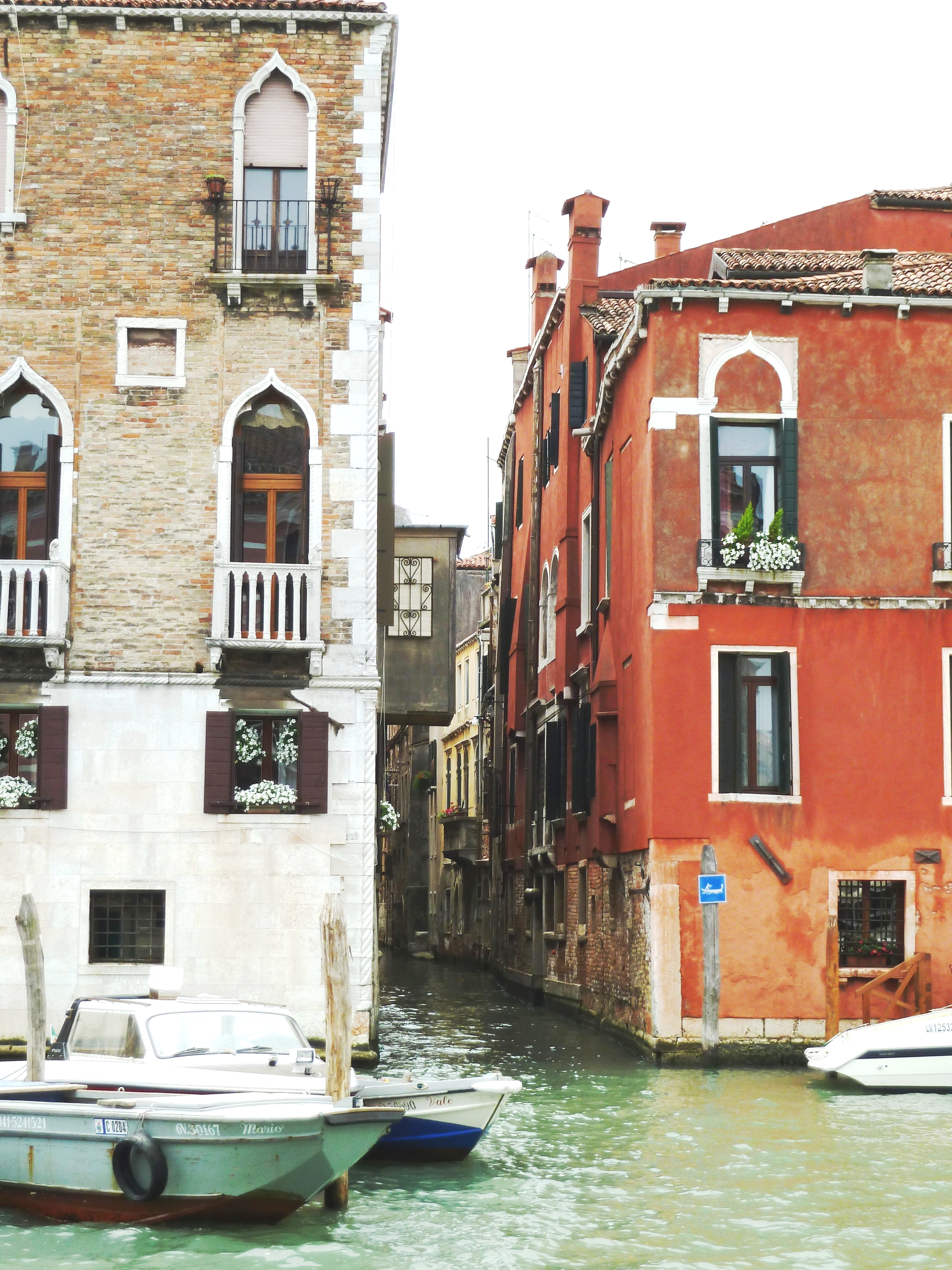 Rio di San Cassiano (Venice)